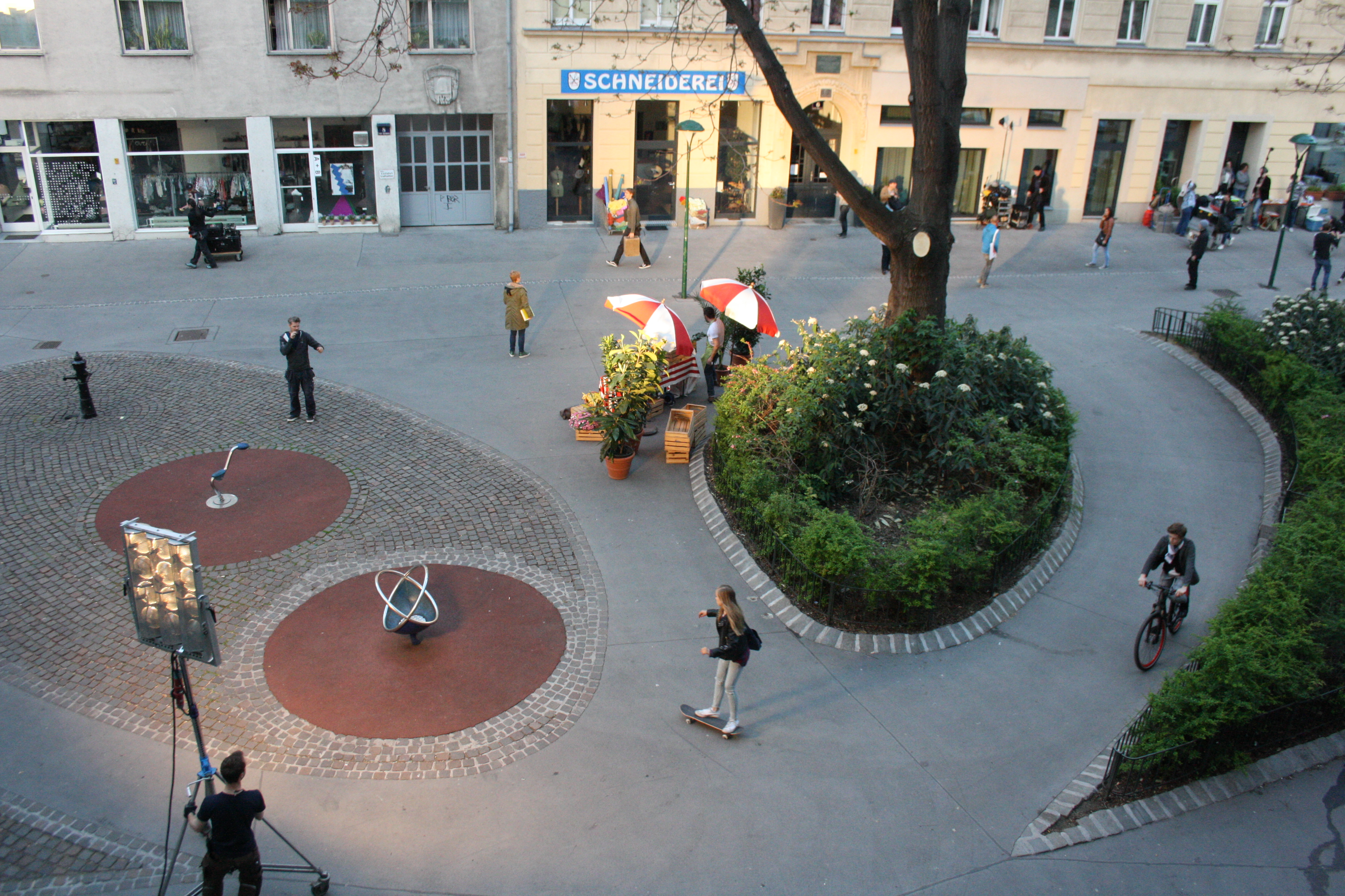 Das Filmset von "Hilfe, ich habe meine Eltern geschrumpft" wurde am 25.4.2017 am Ludwig-Hirsch-Platz in Wien 2. aufgebaut.